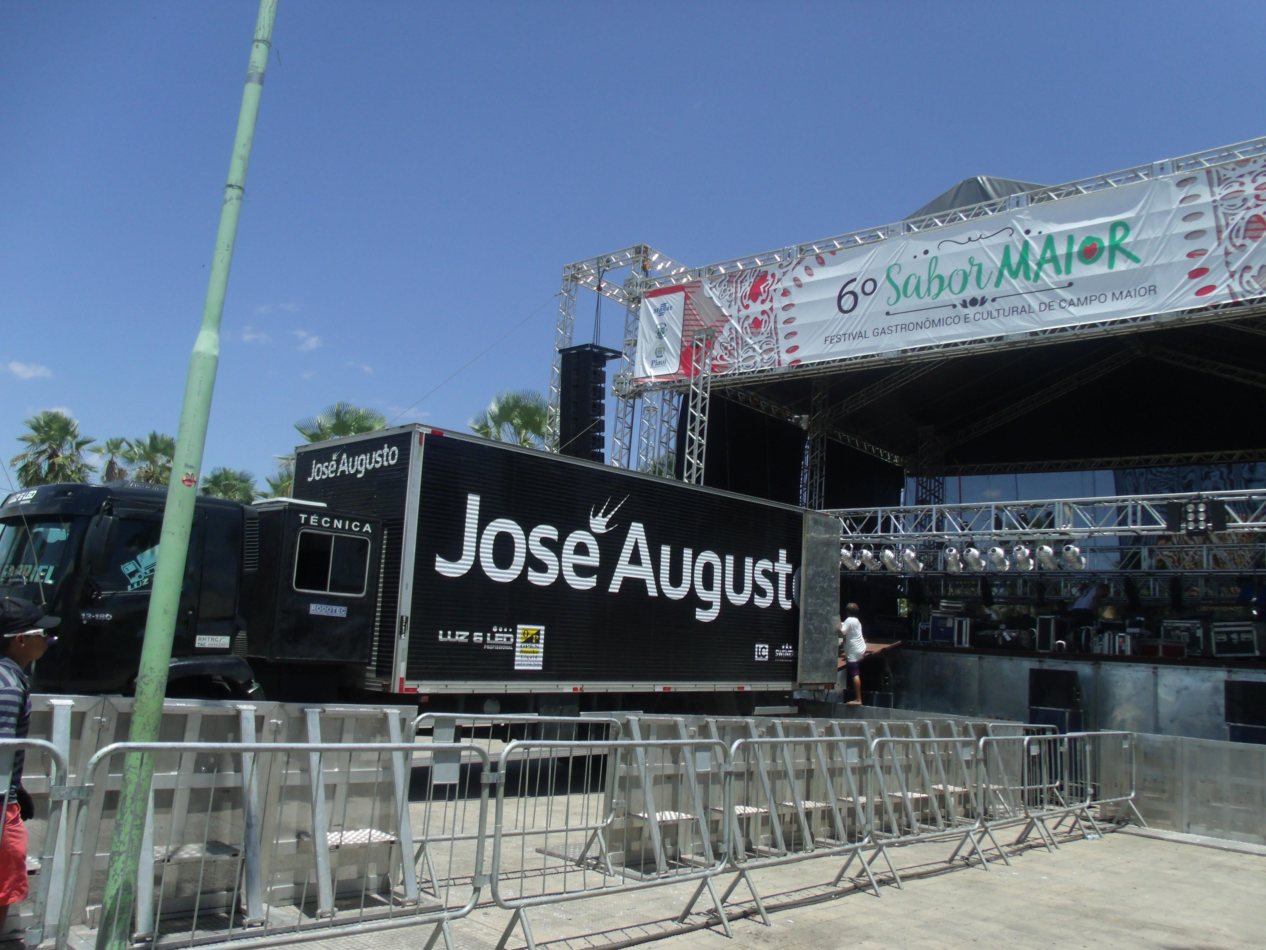 Caminhão do canto e compositor José Augusto no Sabor Maior de 2016.